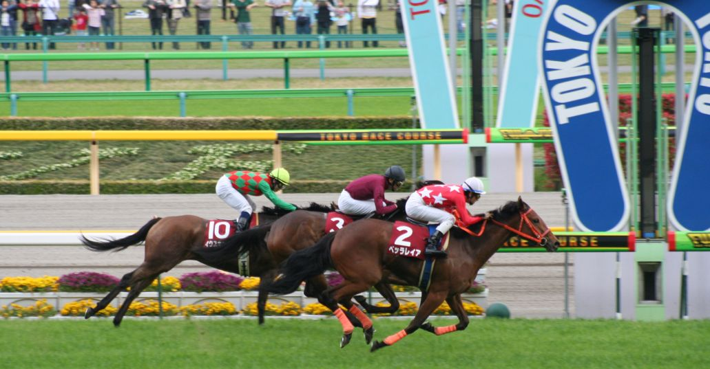 Flora Stakes